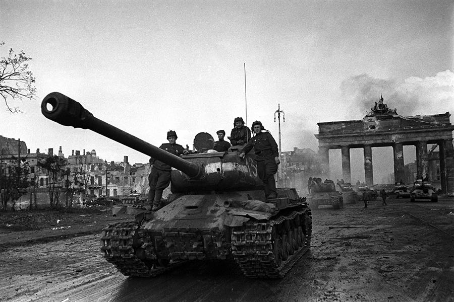 Carri JS II della Seconda Armata carri della Guardia davanti alla Porta di Brandenburgo a Berlino